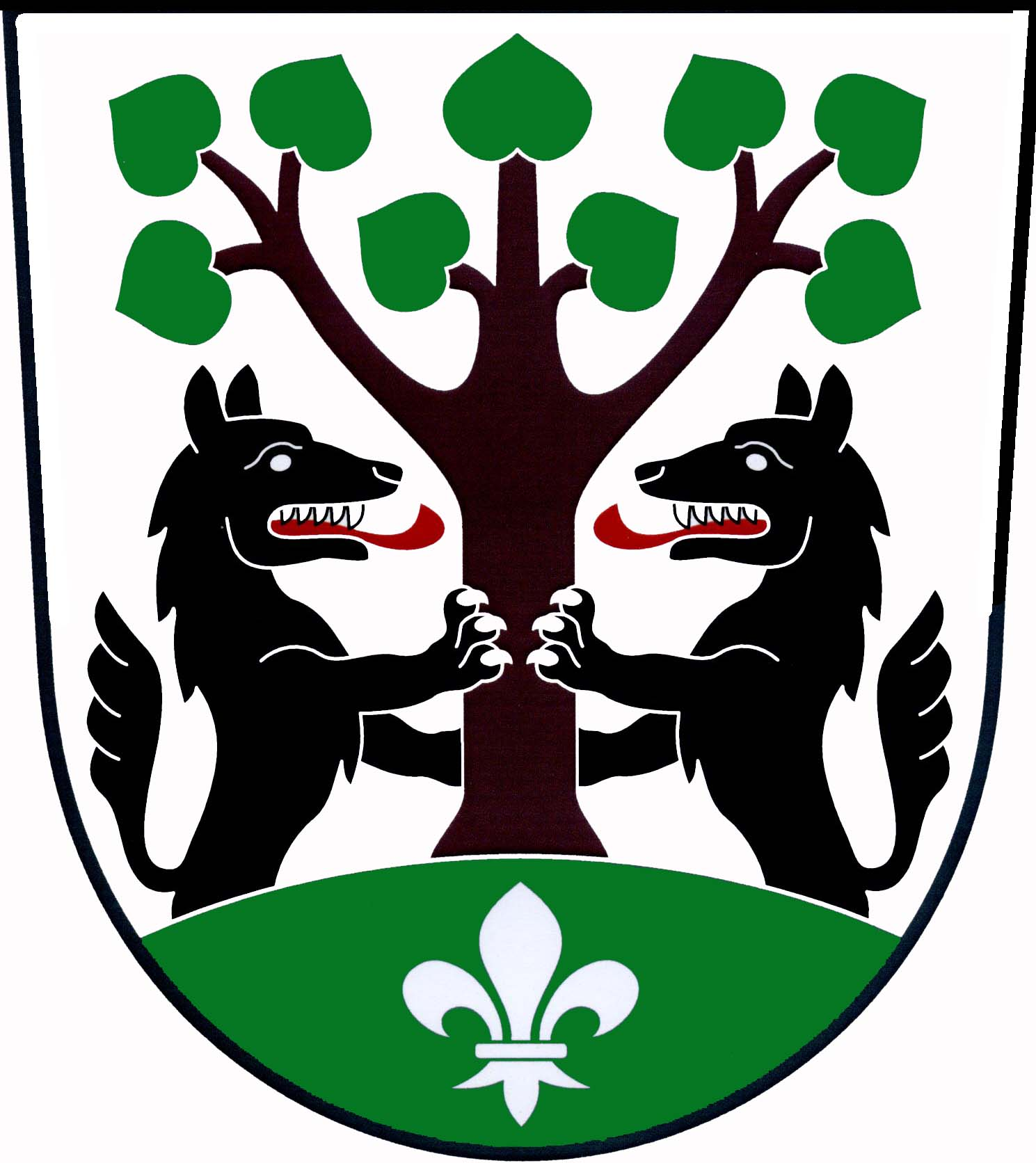 Česky: znak obce Vlčkovice v Podkrkonoší